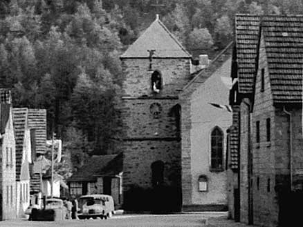 Kirche um 1960 mit provisorischem Turmhelm